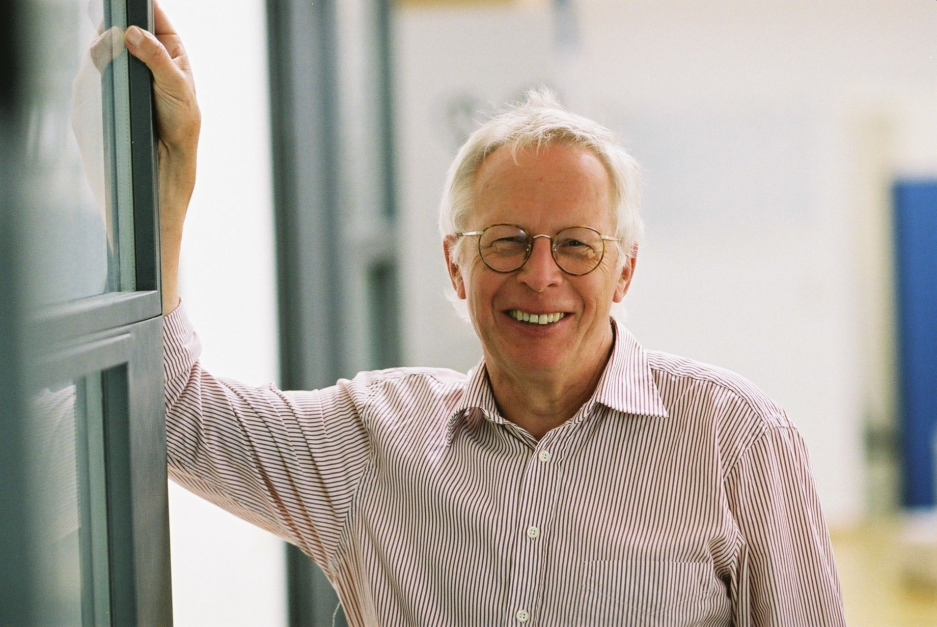 Porträtaufnahme von Egon Becker